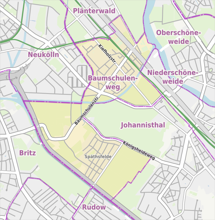 Übersichtskarte der Straßen und Ortslagen in Berlin-Baumschulenweg